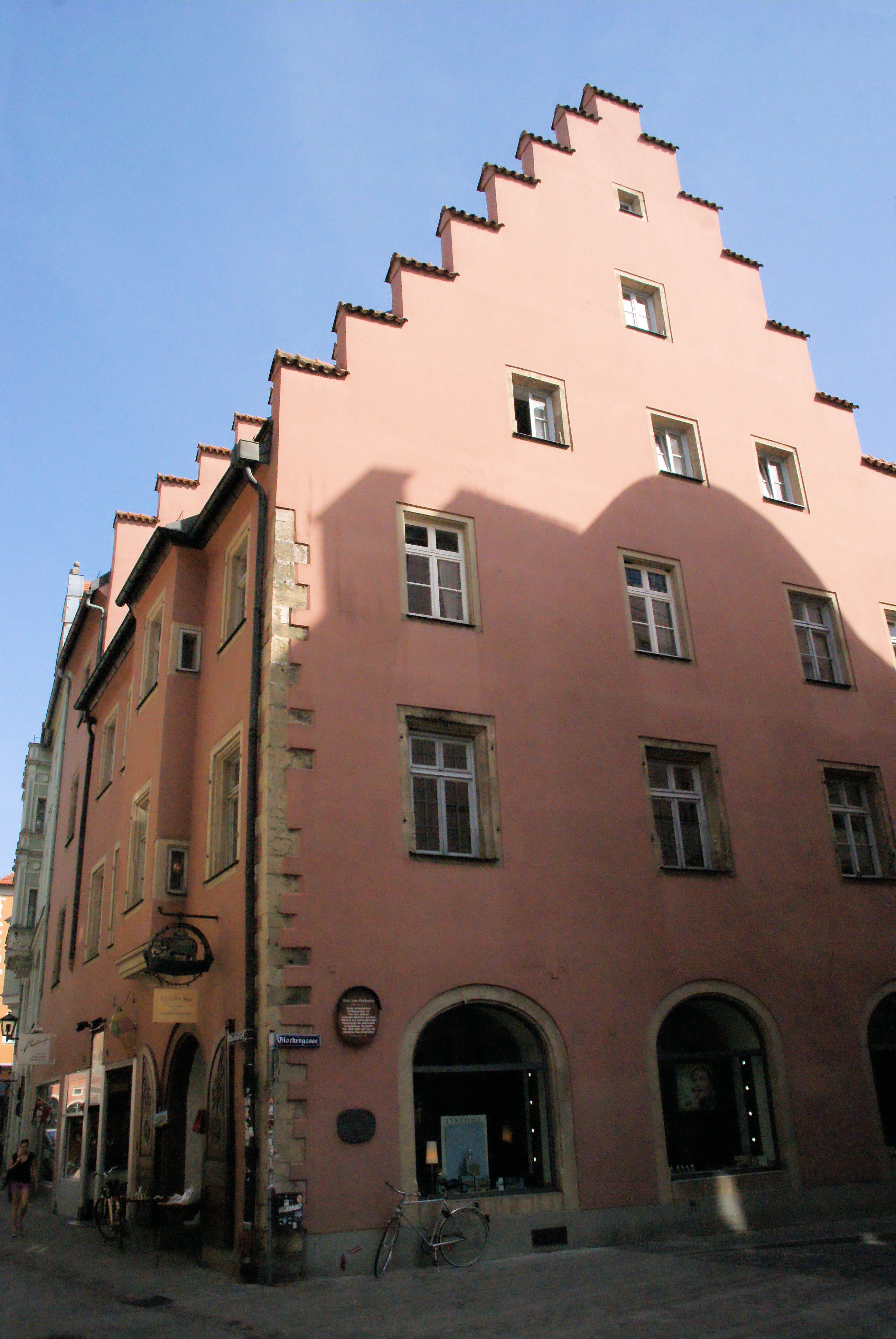 Glockengasse 1, Regensburg, ehem. Elefantenapotheke, HauptgebäudeThis is a photograph of an architectural monument.